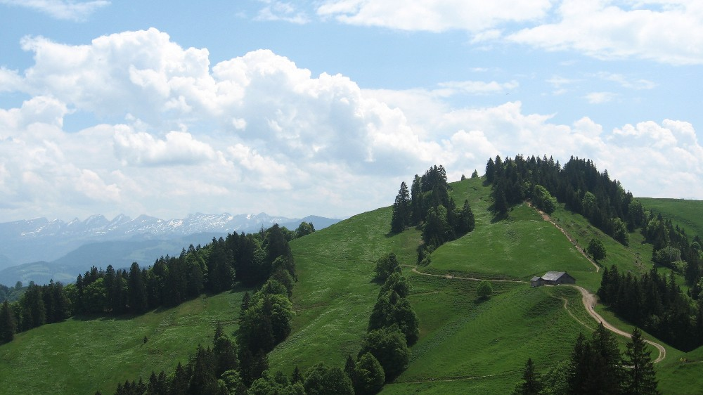 Tweralpspitz von Norden mit Churfirsten links